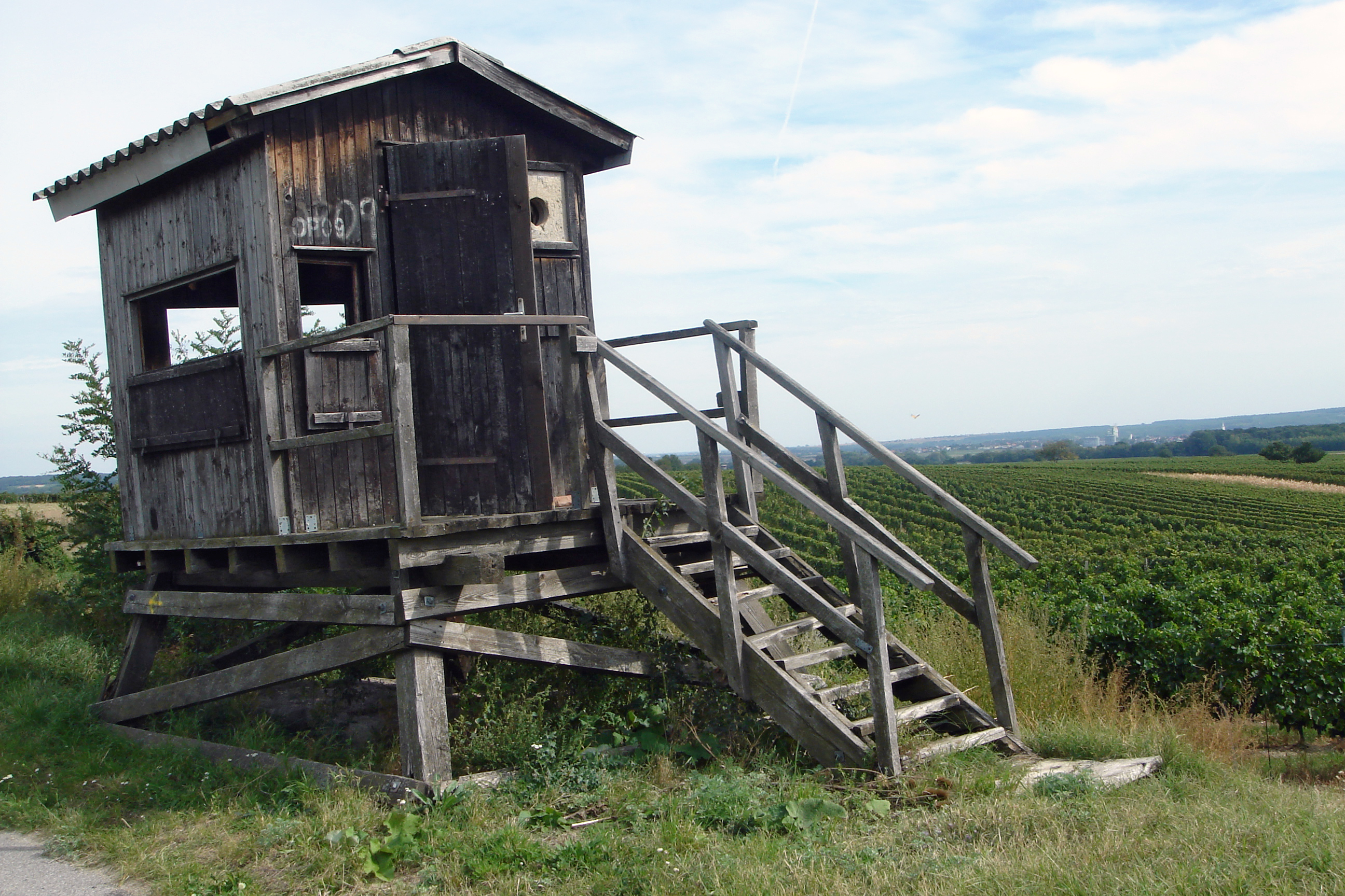 Neckenmarkt, Burgenland, ehemaliges Grenzerhäuschen